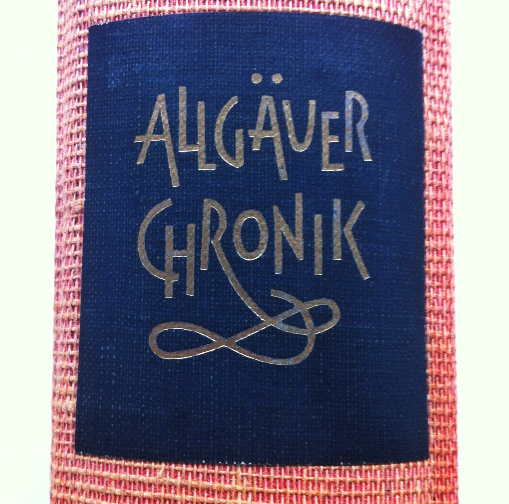 Allgäuer Chronik